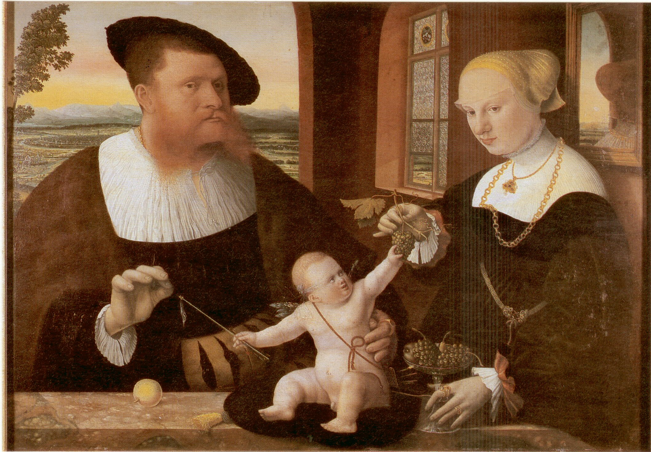 Bildnis des Justinian und der Anna von Holzhausenlabel QS:Lde,"Bildnis des Justinian und der Anna von Holzhausen"